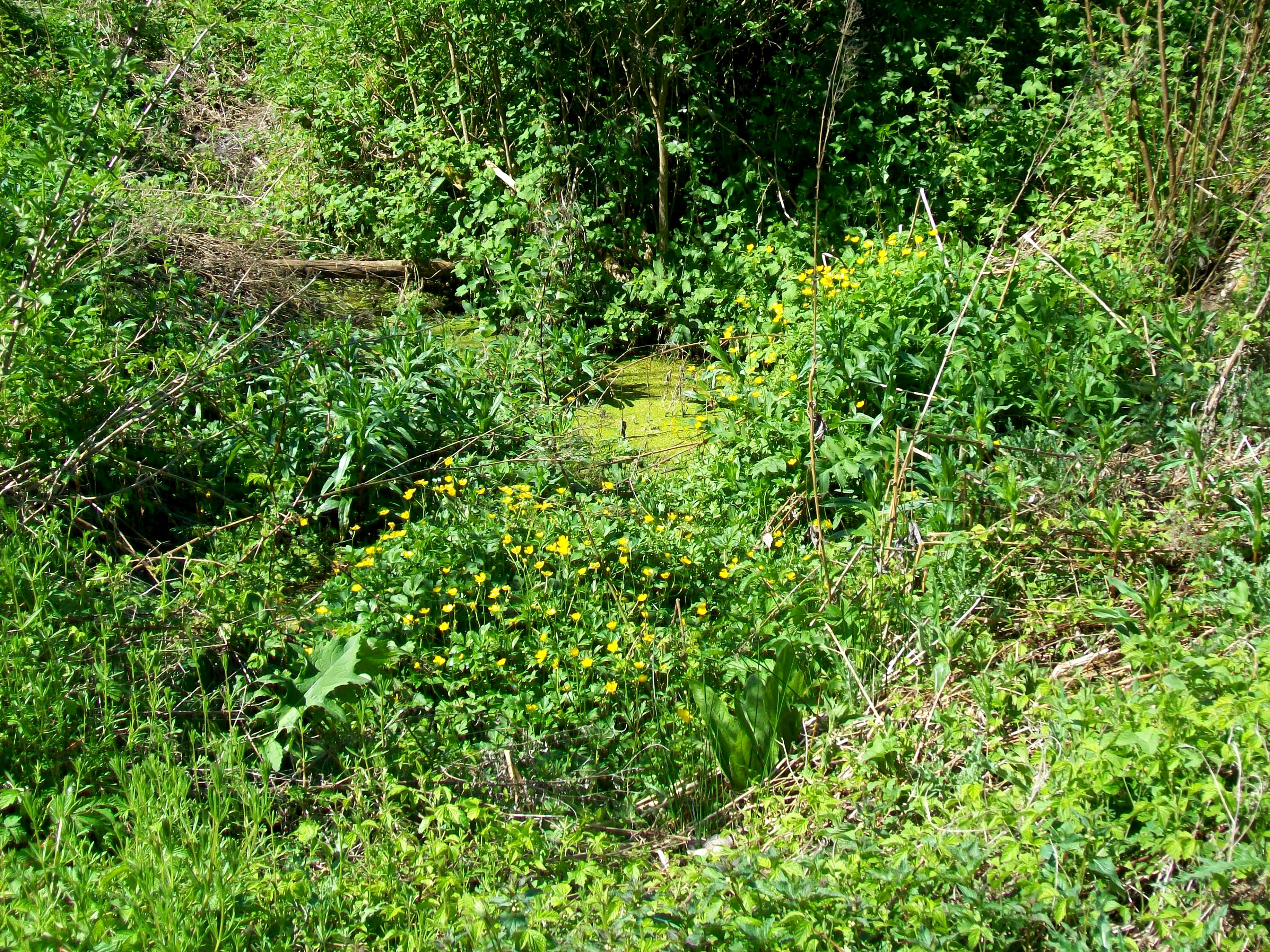 Le marais de l'Aunette au nord de Barbery. Tout au long de son parcours, l'Aunette traverse des zones humides. Ici, la vallée du ruisseau est à plus de dix mètres en-dessous du niveau des plaines agricoles autour, avec des pentes abruptes. Toutefois, si l'Aunette n'est pas à sec une fois quittée la commune de Rully, elle ne présente que de l'eau stagnante sur la commune de Barbery.